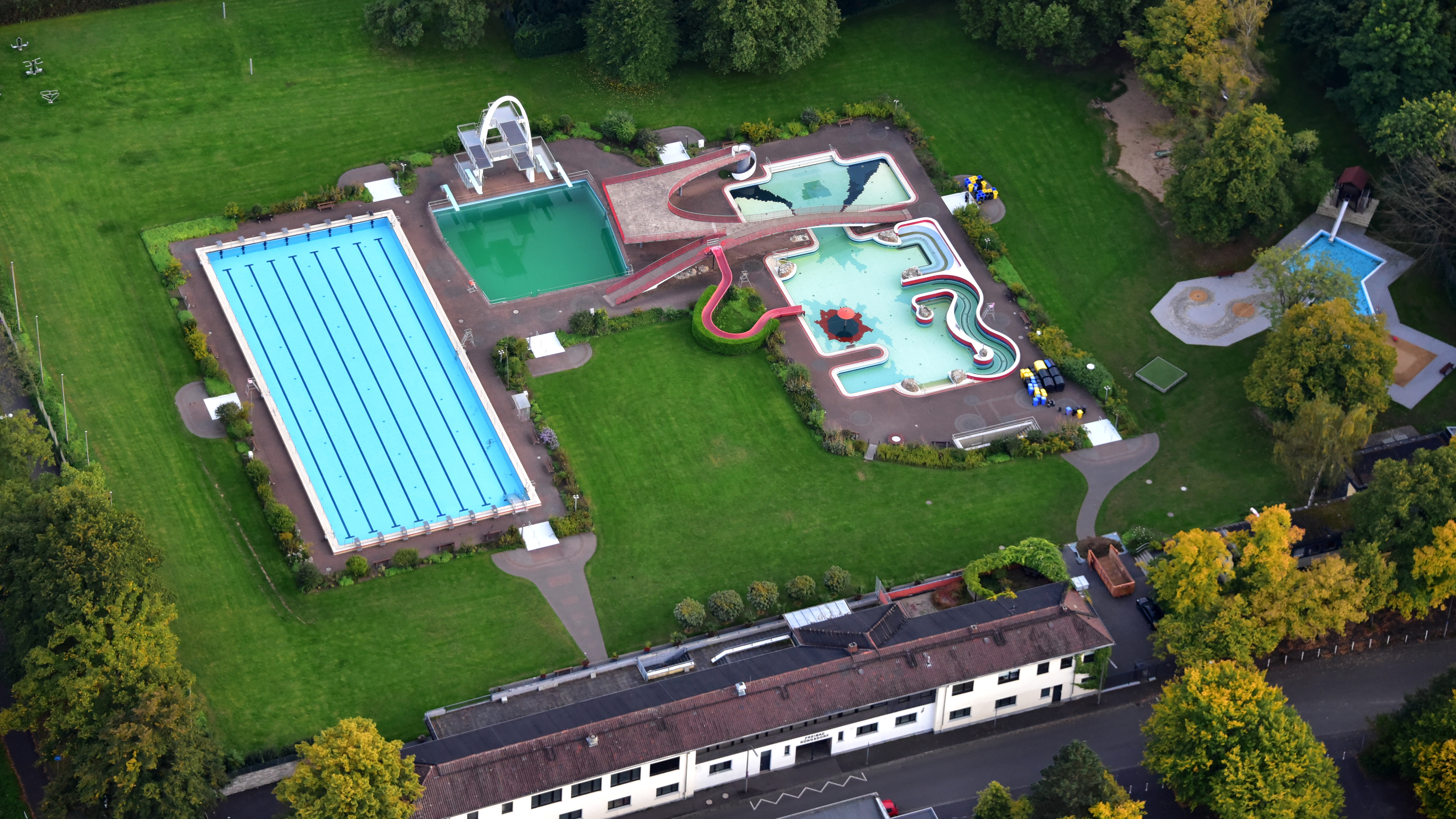 Freibad Rüngsdorf, Panoramabad, Luftaufnahme (2017)